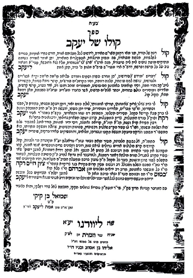 ספר קולו של יעקב